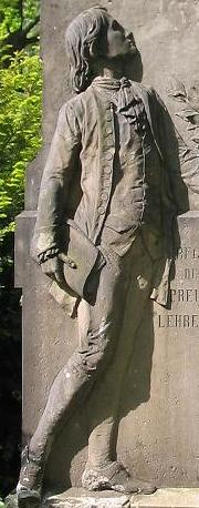 Schüler, Ausschnitt aus dem Denkmal für Johann Julius Hecker Das Denkmal steht auf der Schlossinsel, Berlin-Köpenick. Das komplette Denkmal ist abgebildet bei Johann Julius Hecker. Selbst fotografiert, Mai 2004 GNU FDL